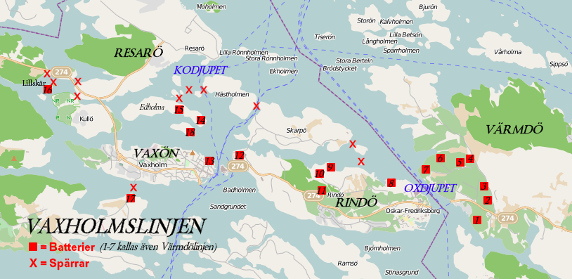 Vaxholmslinjens batteriplatser 1-18 (källa: Erik Himmelstrand Vaxholms fästningsmuseet) This map may be incomplete, and may contain errors. Don't rely solely on it for navigation.